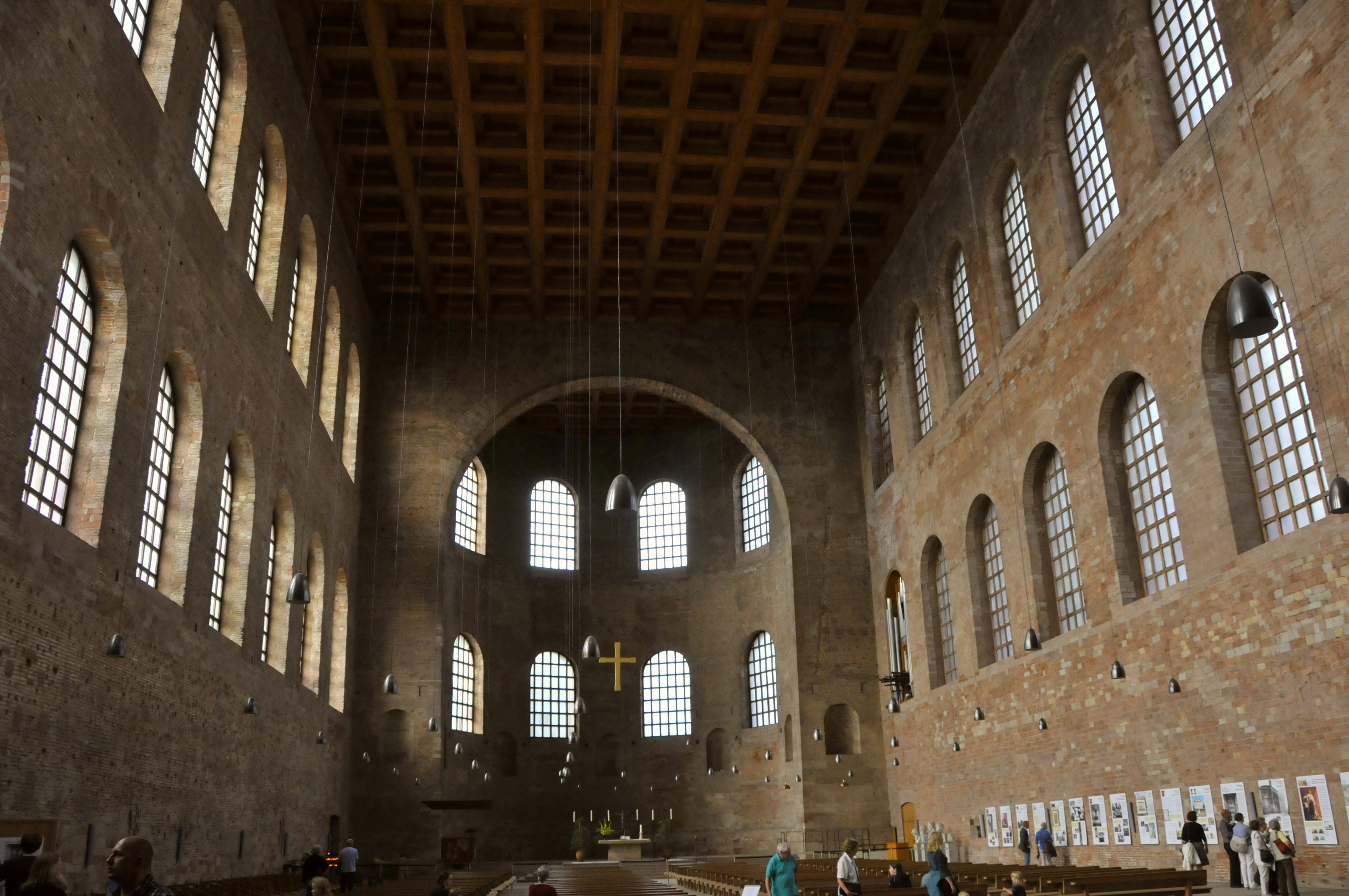 Trier, Konstantin-Basilika, innen